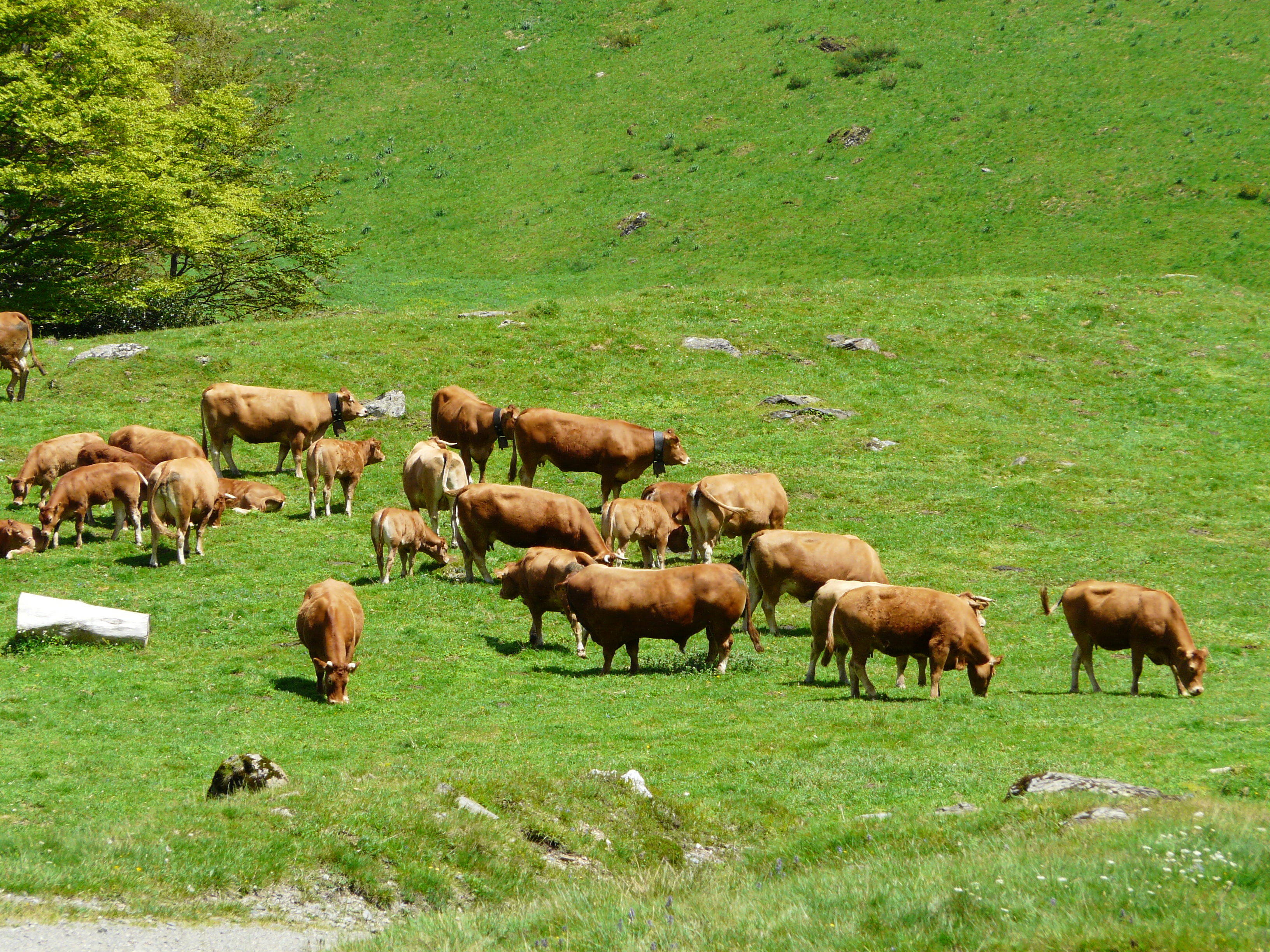 Troupeau de bovins de race limousine en pâturage estival, Haute-Garonne, France.